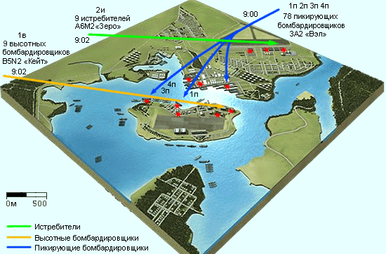 События в бухте Перл-Харбор во время второй волны японского авиаудара.